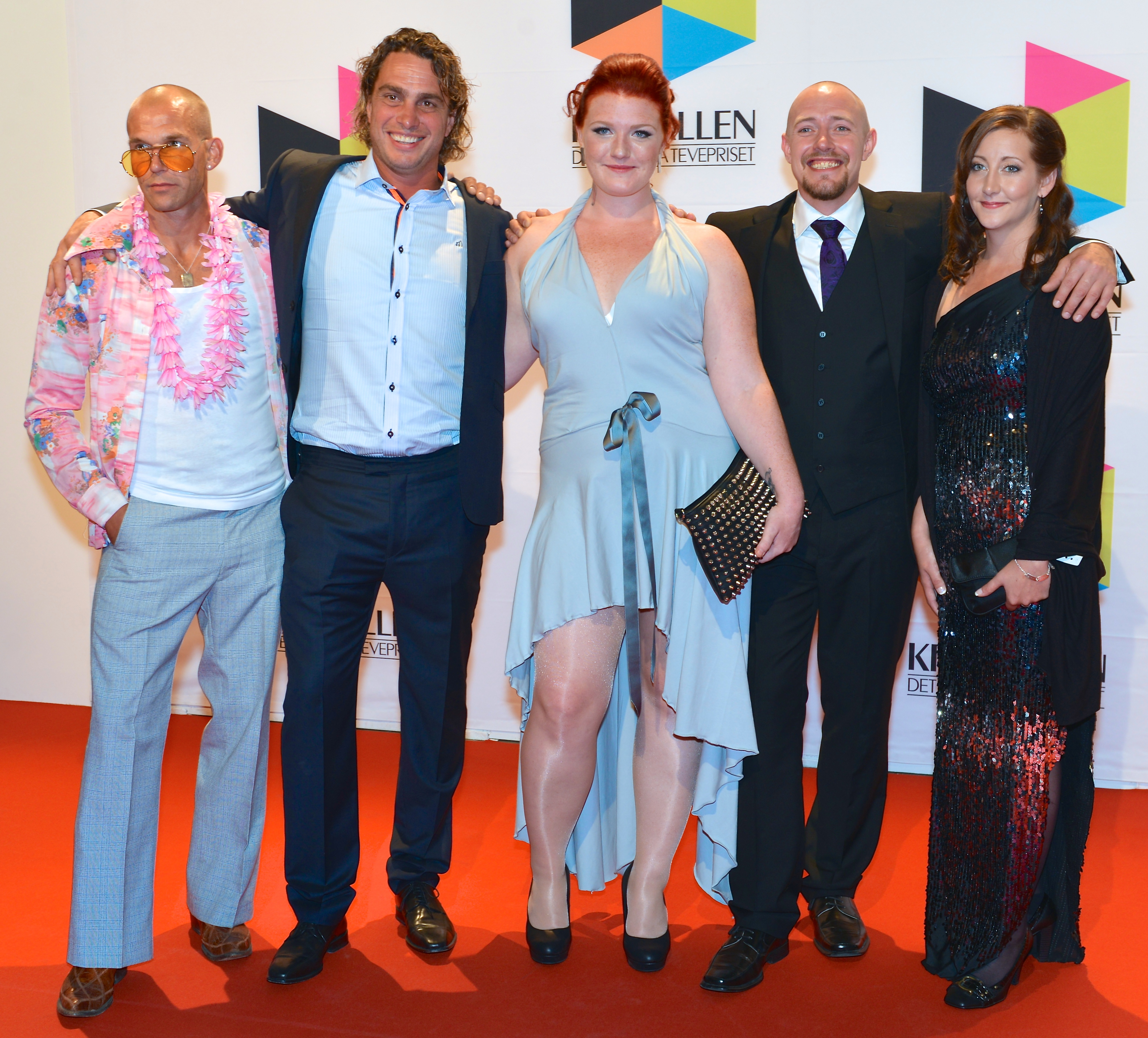 Gänget bakom Nybyggarna på Kristallen-galan den 30 augusti 2013.